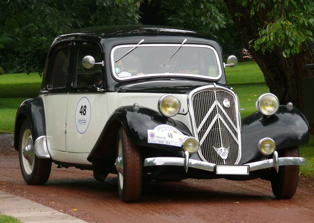 Citroën 11 CV Legère